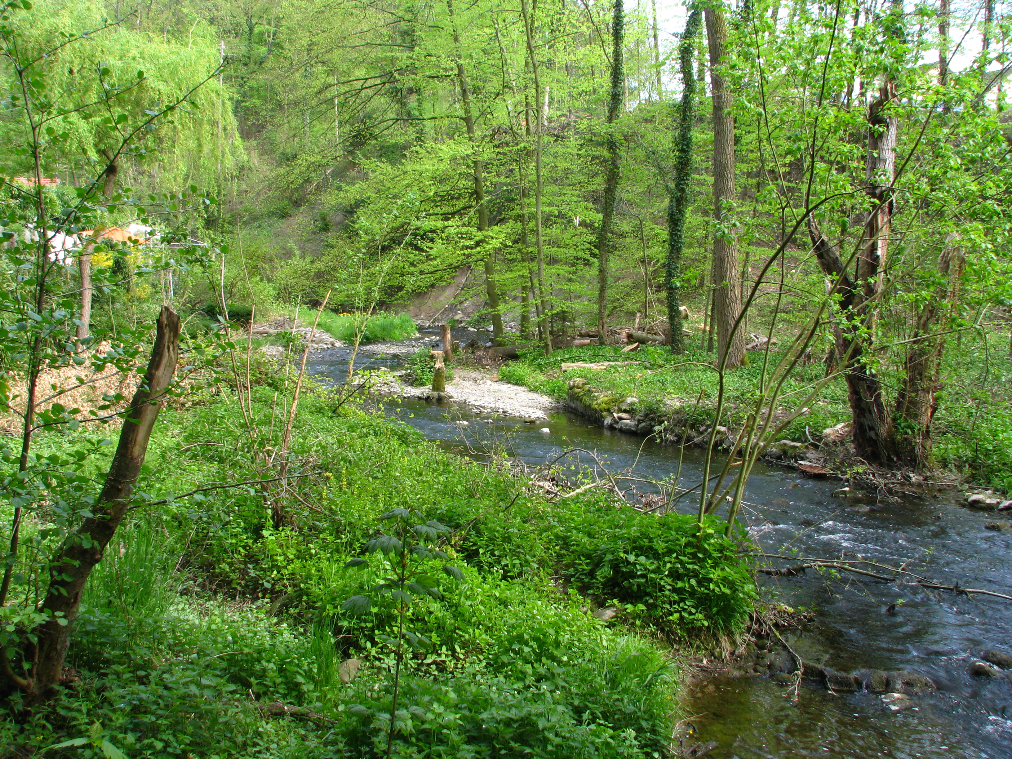 Furt in Würenlos (AG)